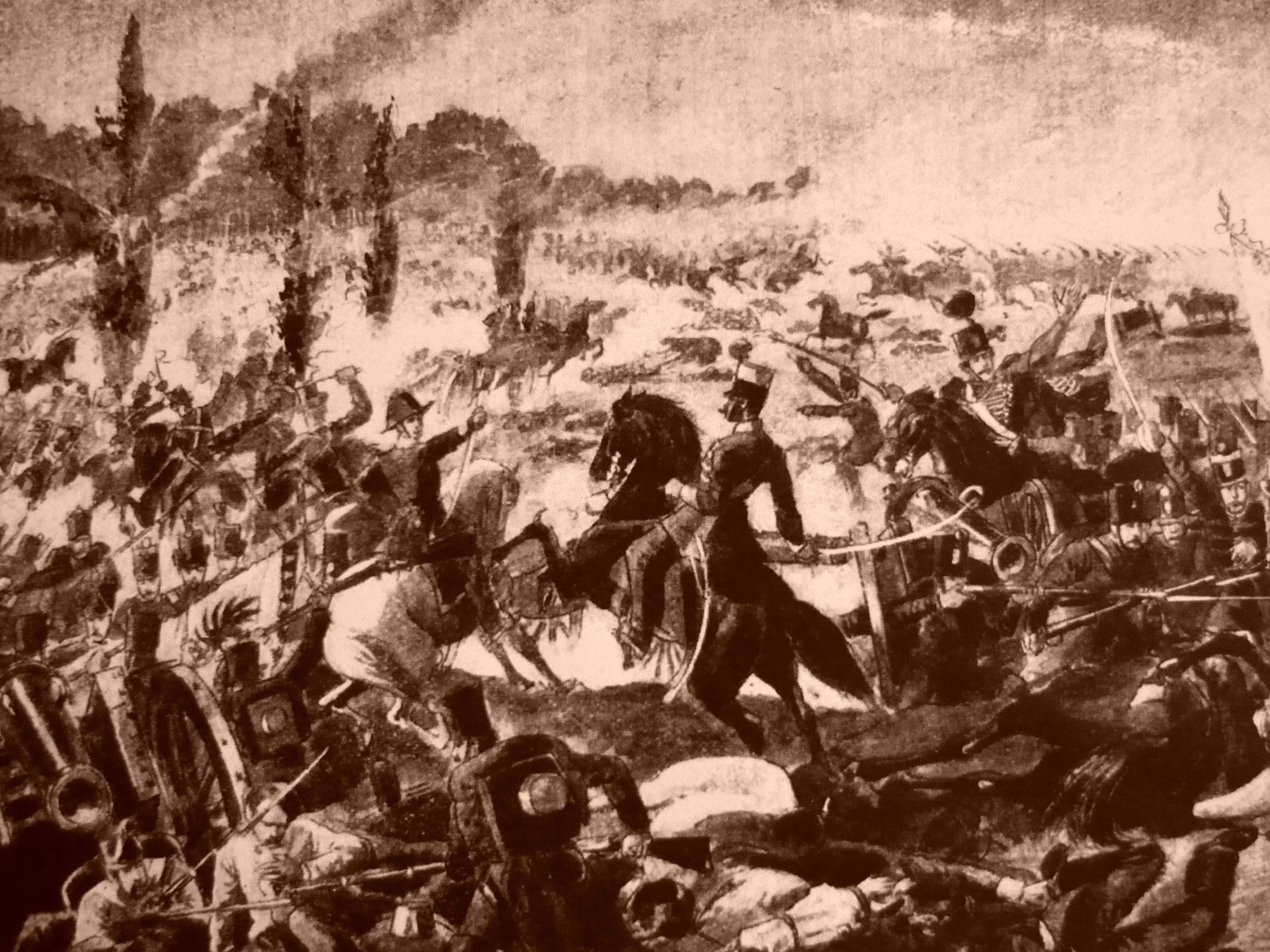 Egy nagysallói csatát ábrázoló festmény.